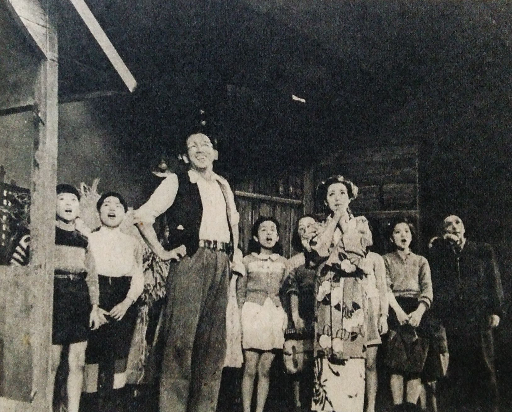 劇団東芸による『蟻の町のマリア』の1953年公演。前列は千葉栄（左）と草香蘭子（右・北原怜子役）。